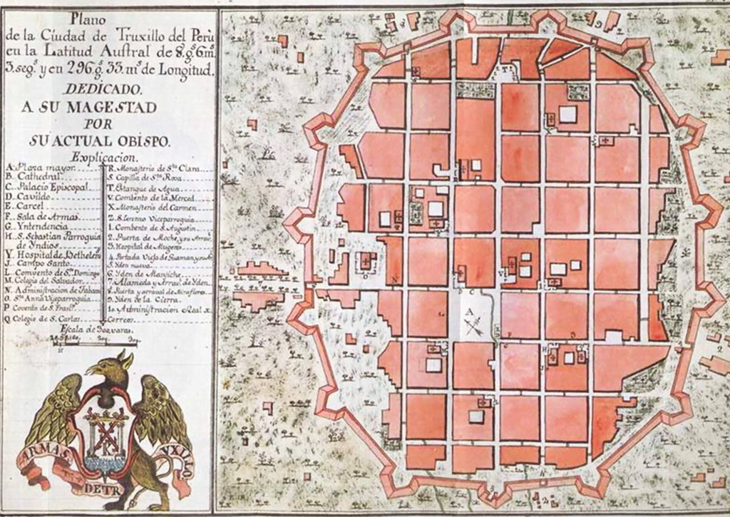 Plano de la ciudad de Trujillo en 1786. Se observa La Muralla de Trujillo rodeando el Centro Histórico de la ciudad en magistral forma elíptica. Fue levantada por el arquitecto italiano Joseph Formento, quien inició su construcción el 19 de febrero de 1687 tomando como base el diseño realizado por Leonardo Da Vinci para la ciudad Florencia, su construcción se culminó en 1689.